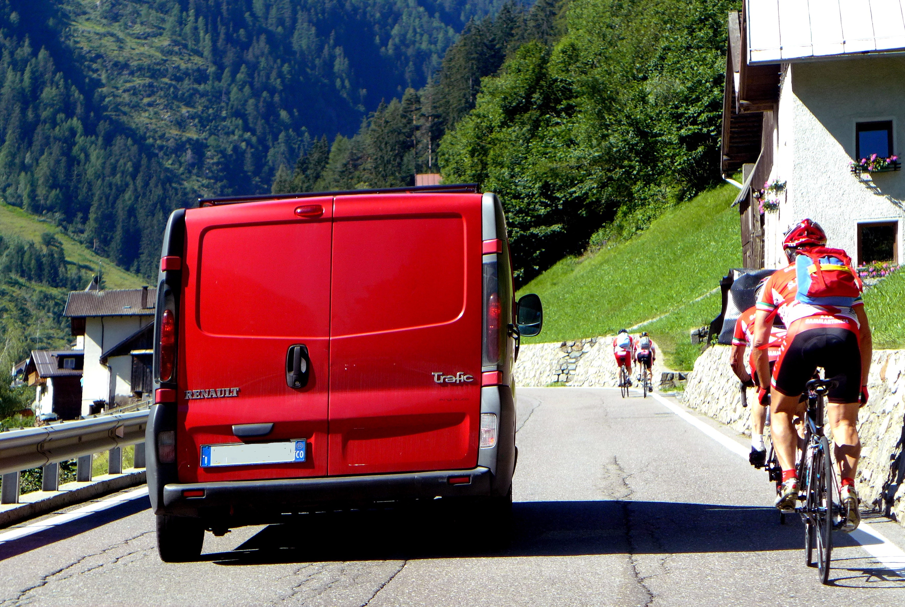 Út a Stelvio-hágóra (Prad am Stilfserjoch, Olaszország)